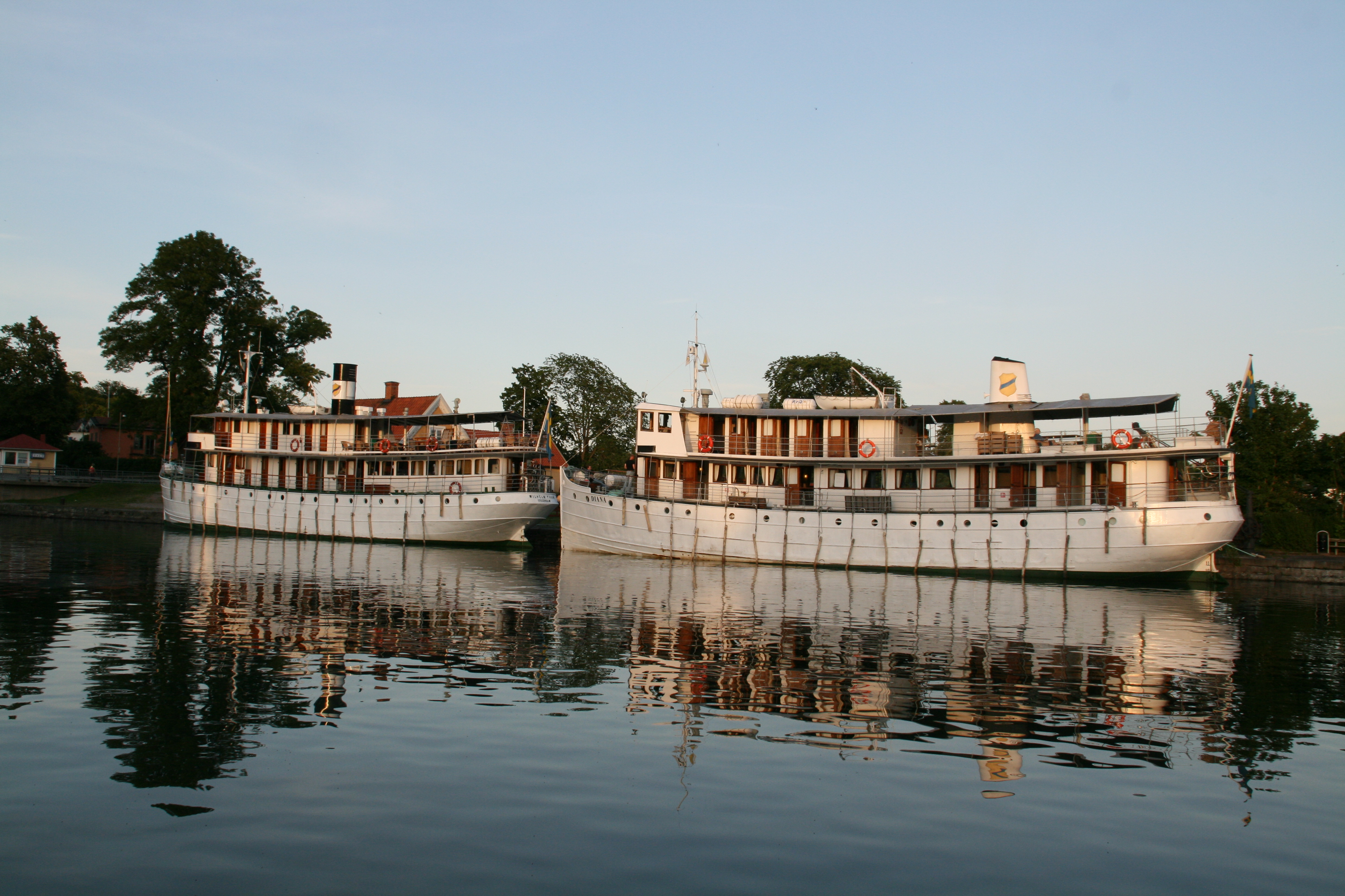 M/S Wilhelm Tham & M/S Diana, Göta Kanal, Motala Hamn